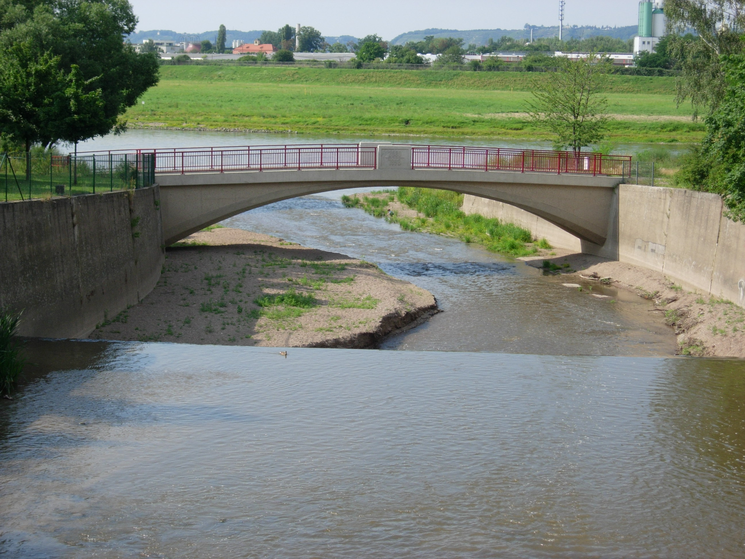 Mündung der Weißeritz bei Dresden-Briesnitz